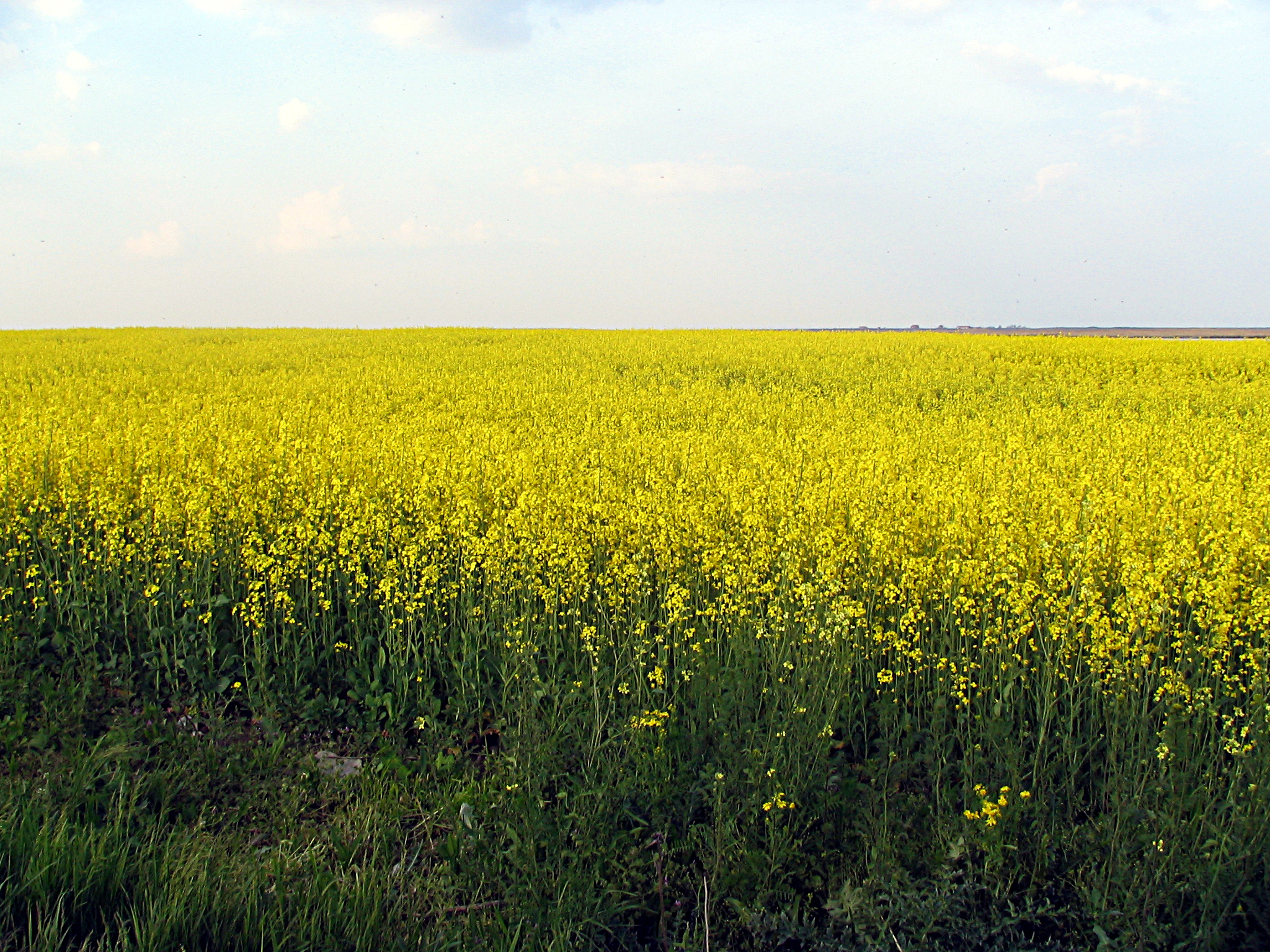 Camp de rapita, in drum spre Histria, Constanta, mai 2005.